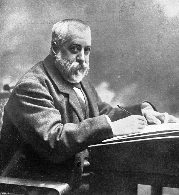 Fotografía de Menéndez Pelayo publicada el 22 de mayo de 1912 con motivo de su fallecimiento